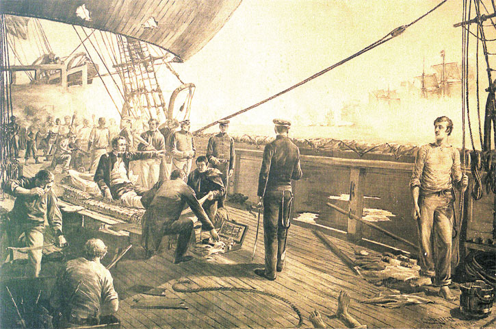 Obra del pintor uruguayo Diógenes Hecquet (1866-1902) “El almirante Brown frente a Montevideo”.